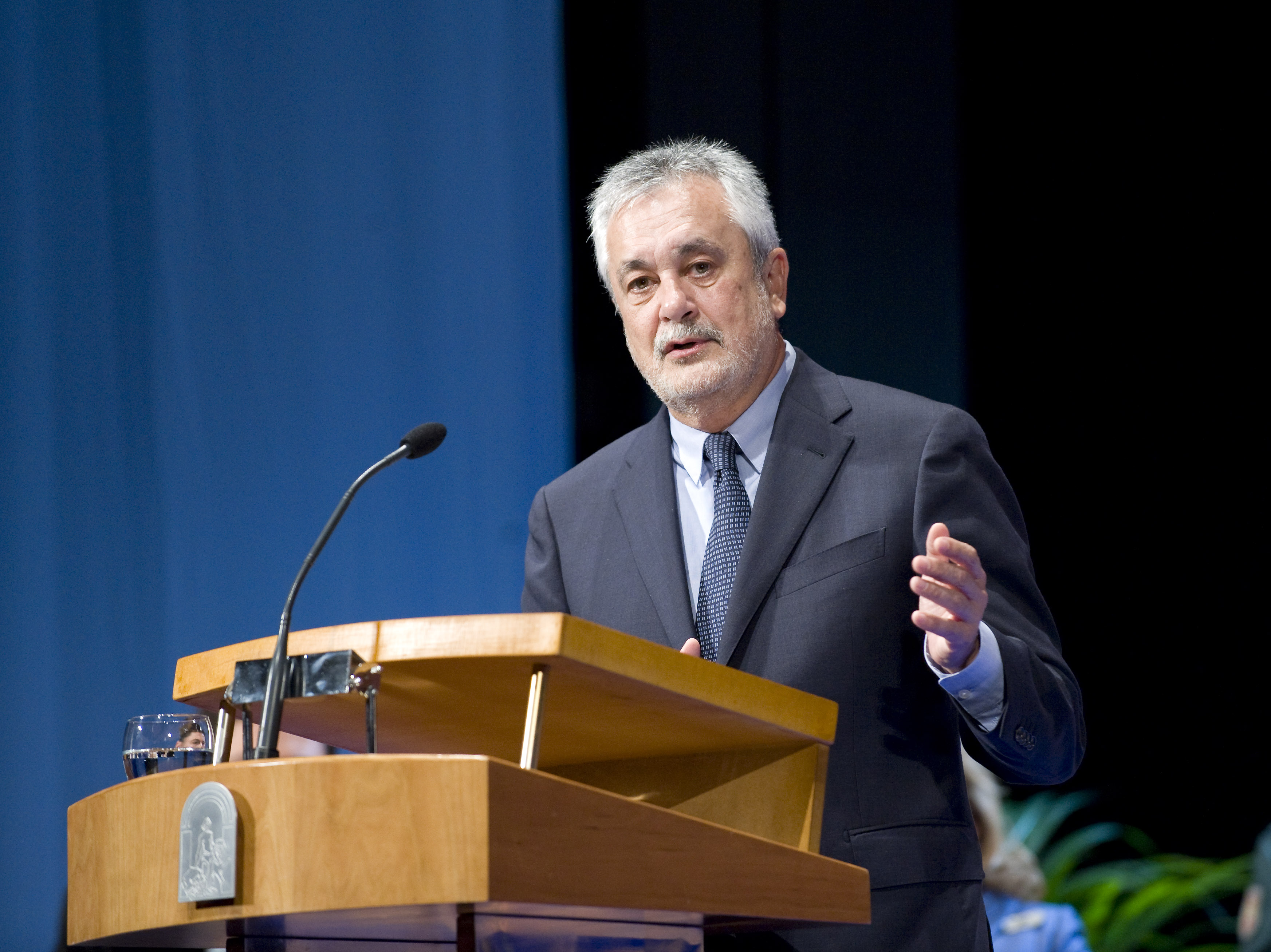 El Presidente de la Junta de Andalucía, José Antonio Griñán, entrega medallas.